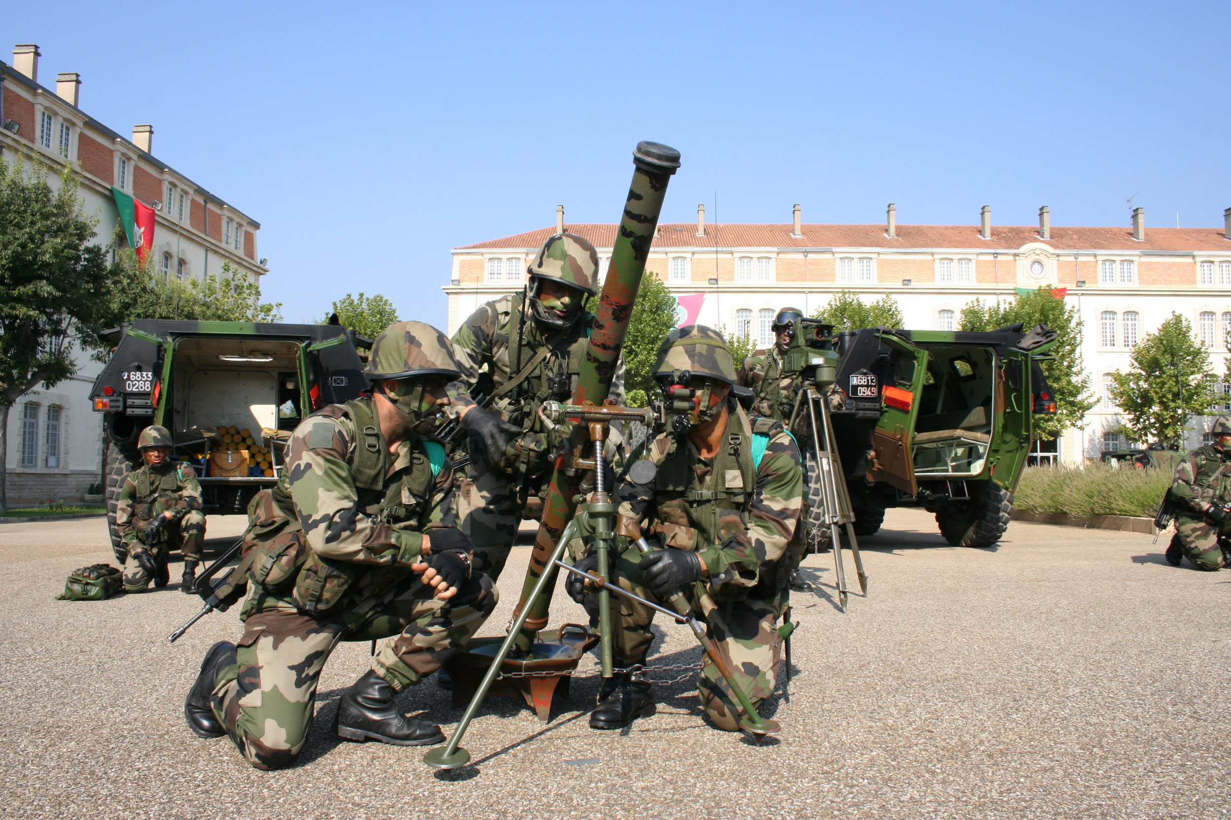 mortier de 81 mm LLR du 2e Régiment étranger d'infanterie (France) en batterie lors d'une démonstration